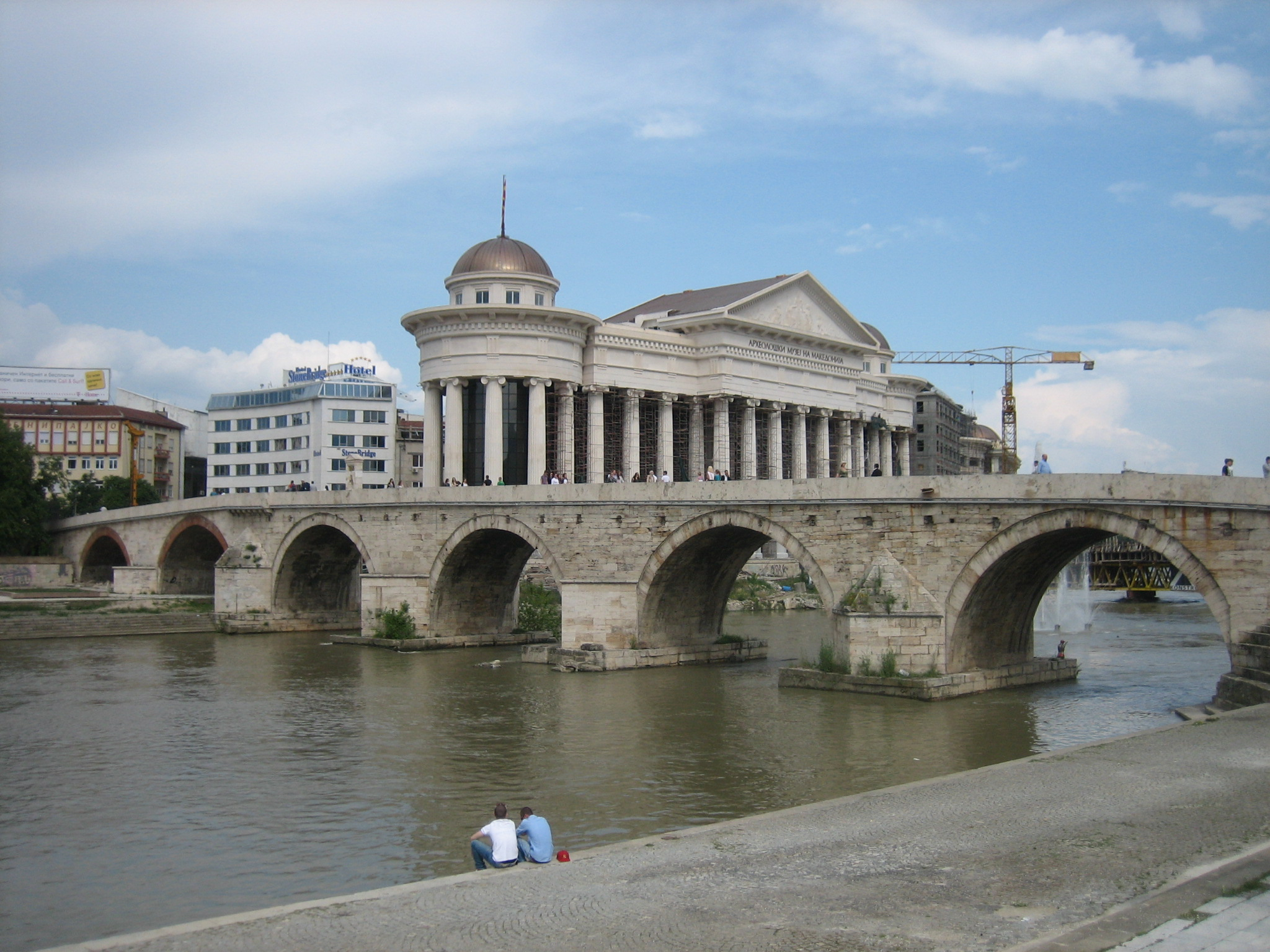 Skopje's iconic landmark.